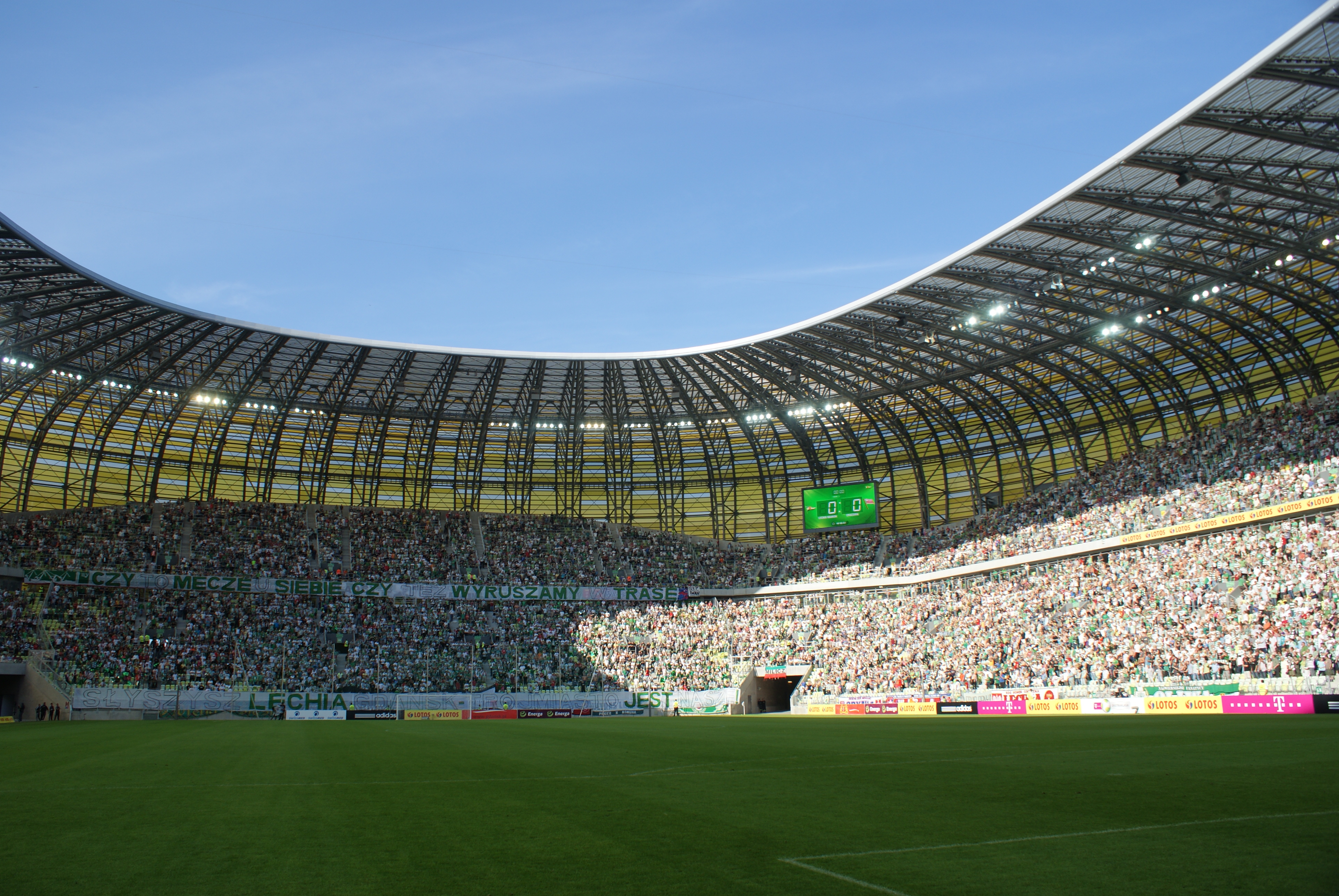 PGE Arena